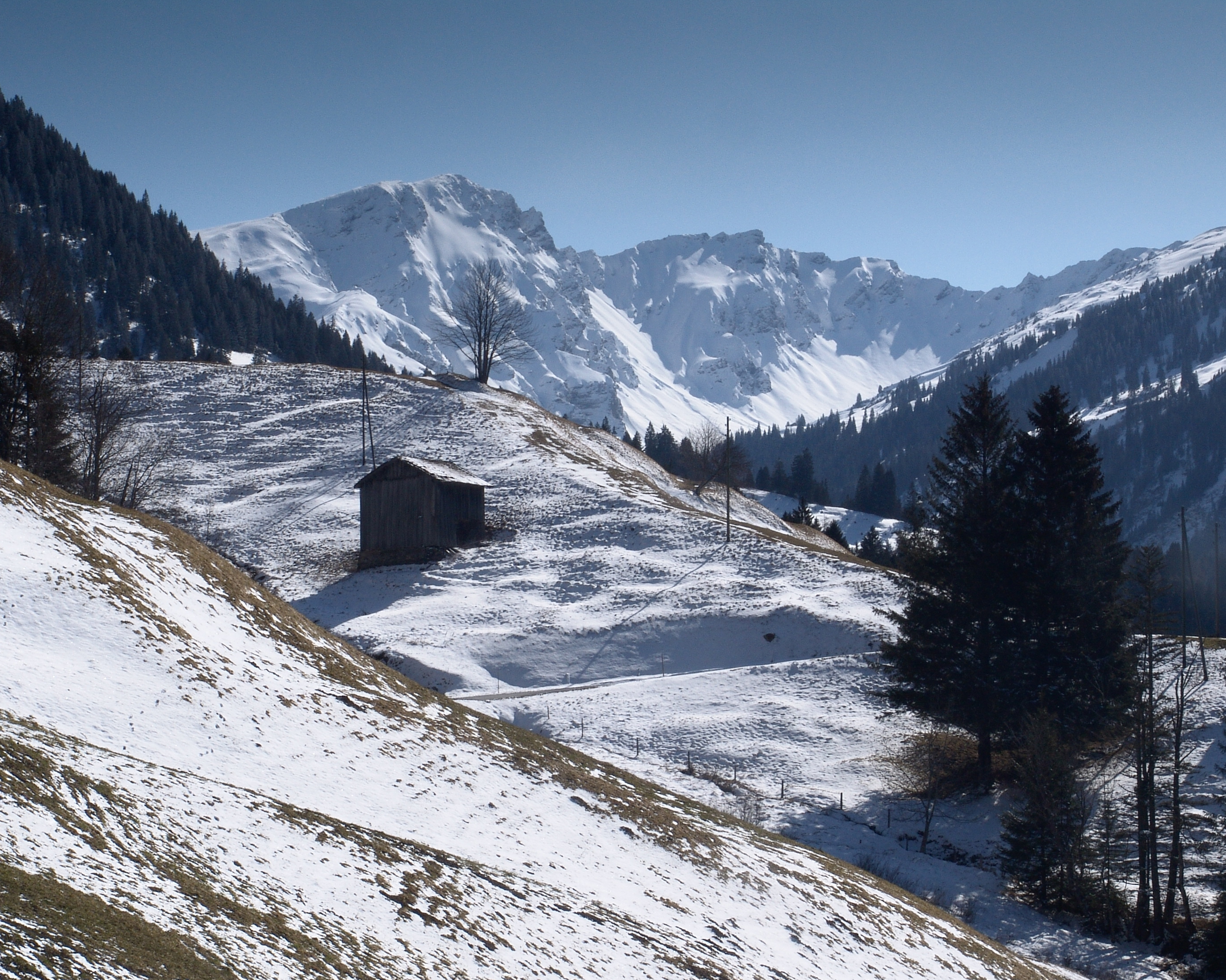 Blick zum Hochwang - Ansicht vom Valzeinatal. Aufnahmestandort - Höhe / Koordinate: Valzeinatal Riss 1144 m - 766238 / 201742 (N46.94595 E9.62242) am 11.3.2007 Der Hochwang ist der höchste Gipfel der Gleichnamigen Gebirgskette.